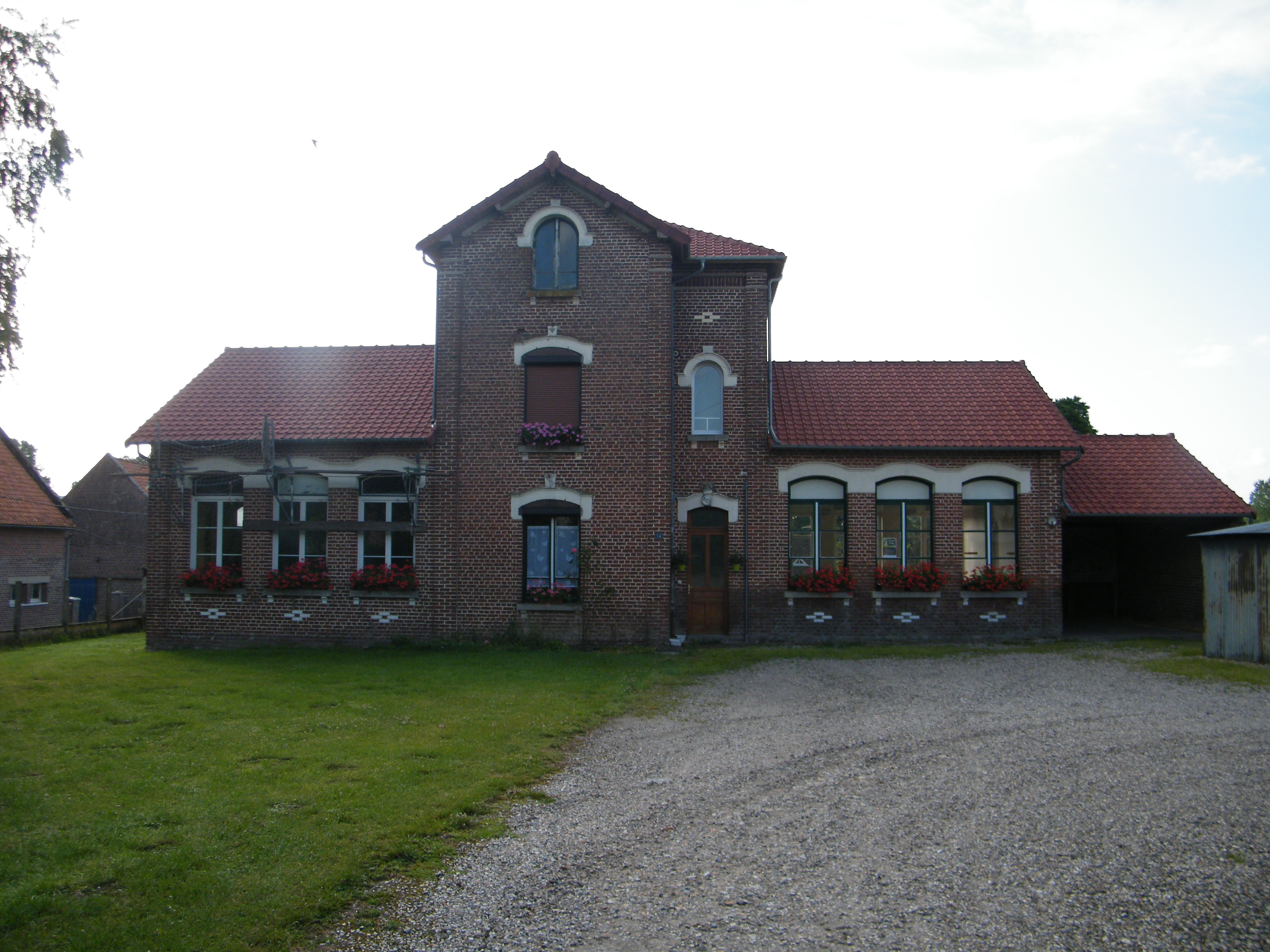 école.